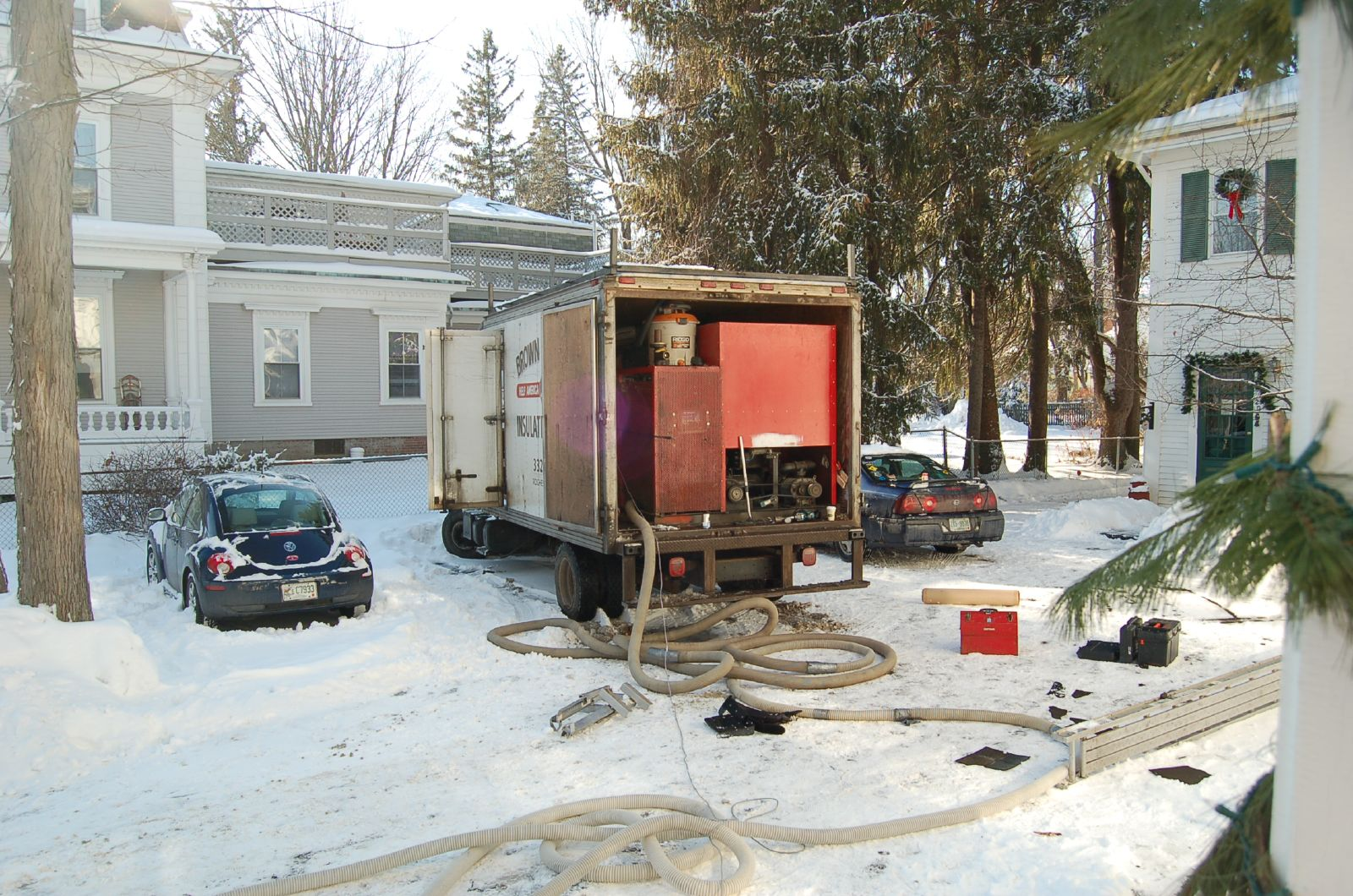 LKW mit Einblasmaschine zum Einbringen von Einblasdämmstoff